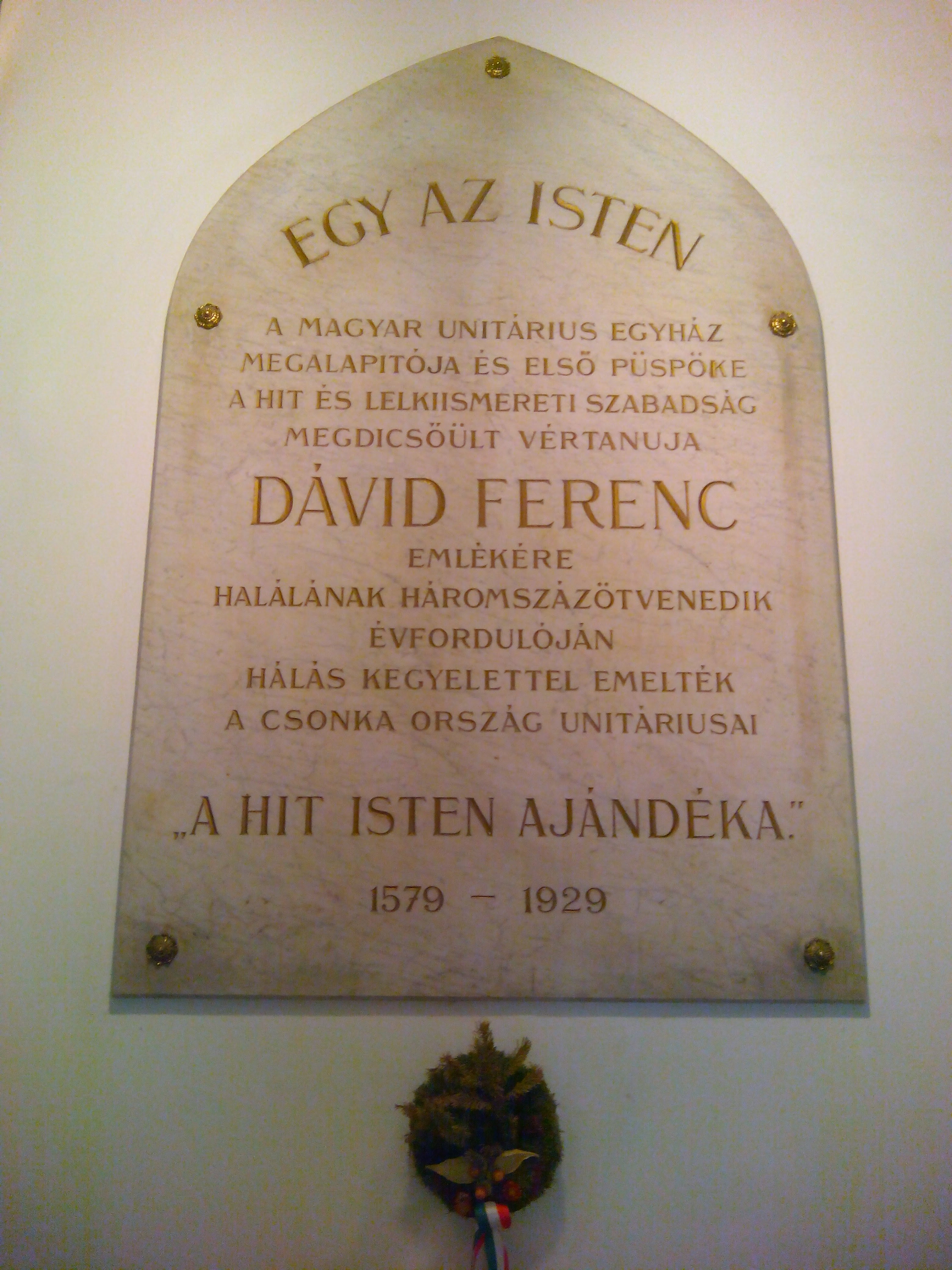 Budapest Dávid Ferenc emléktábla